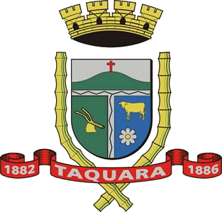 Coat of arm of Taquara, Rio Grande do Sul, Brasil.